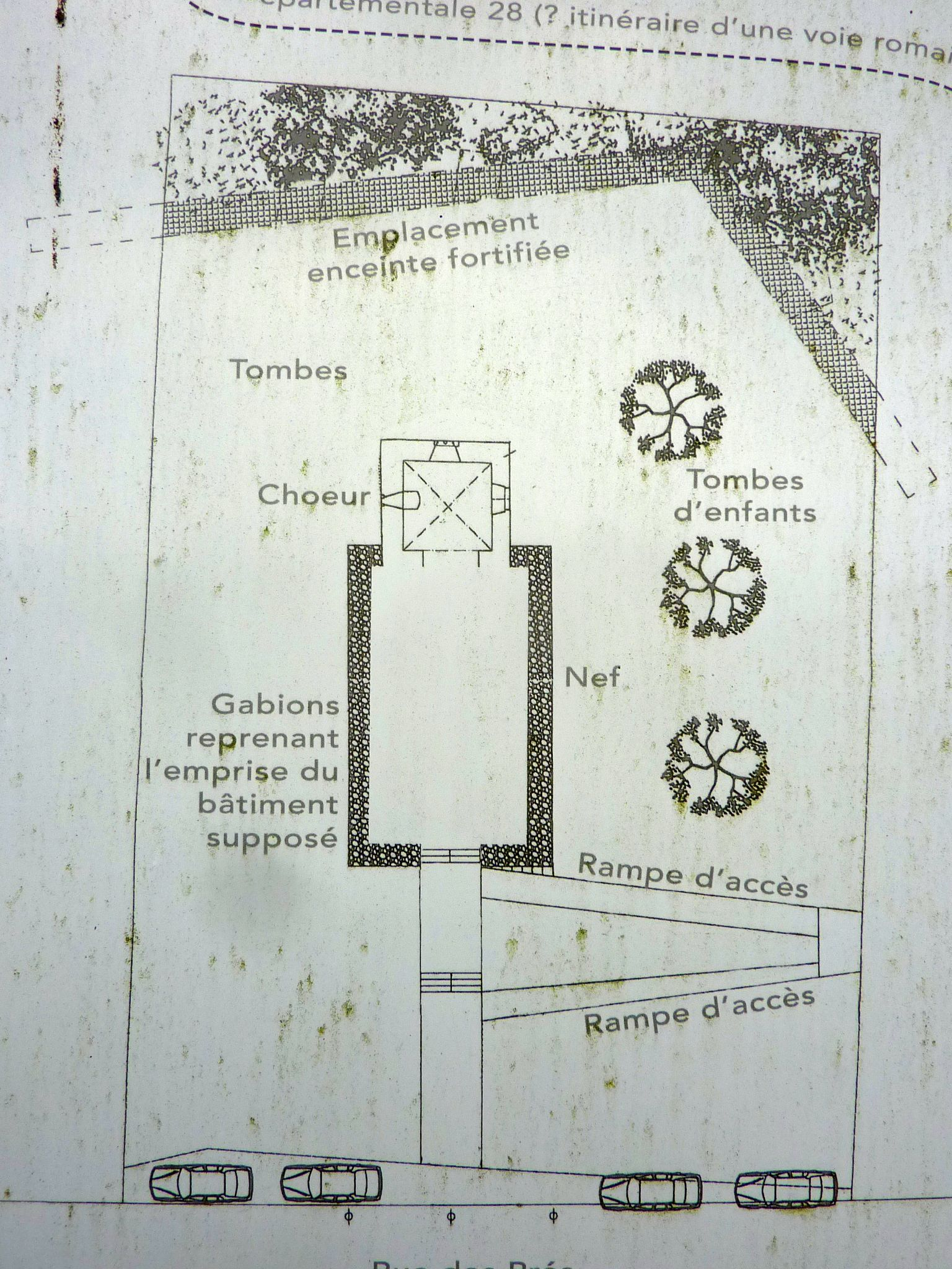 tableau indicateur, Ancienne église dite Altkirch (Reichshoffen)